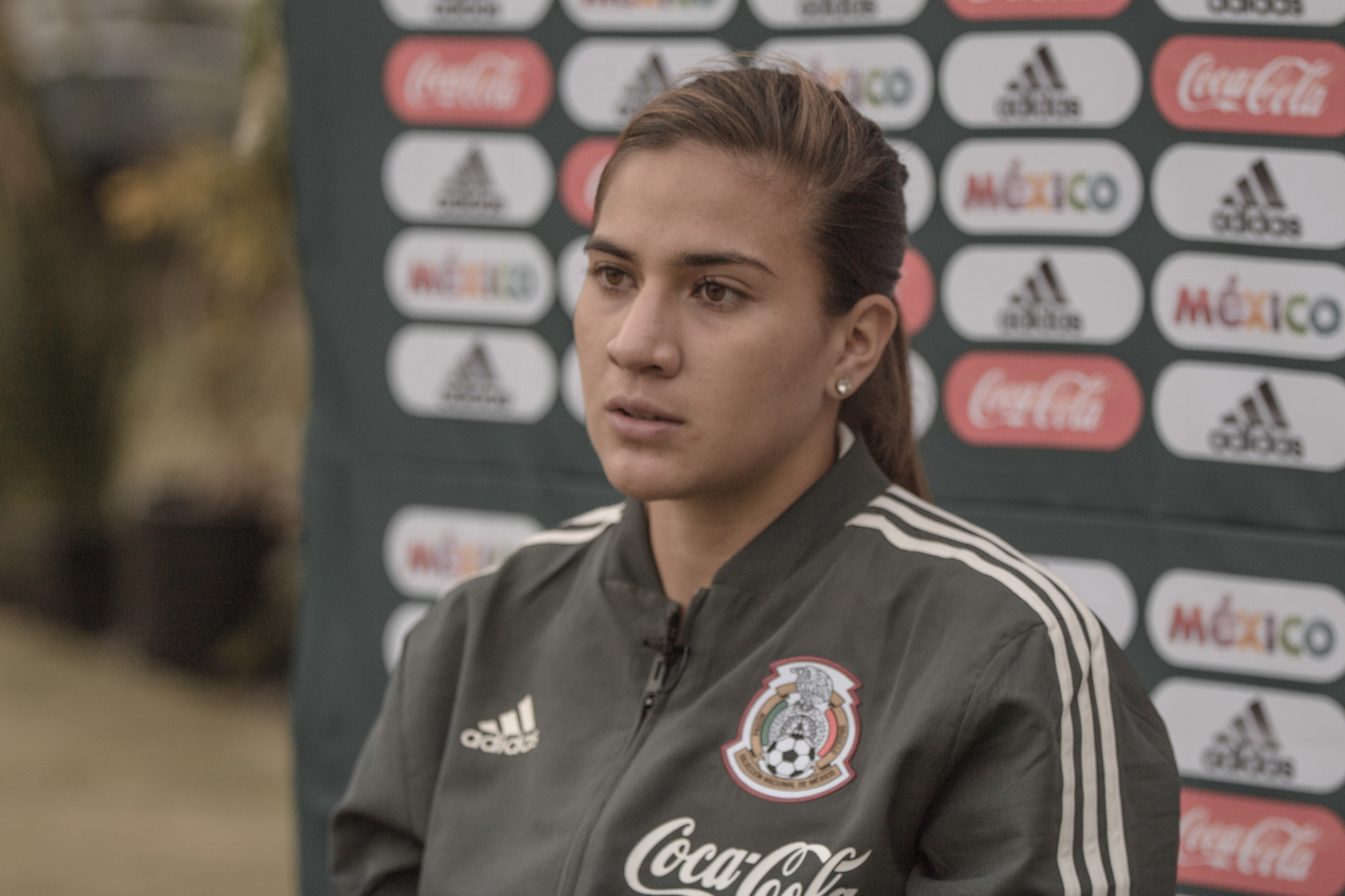 Selección Femenil de Futbol de México.